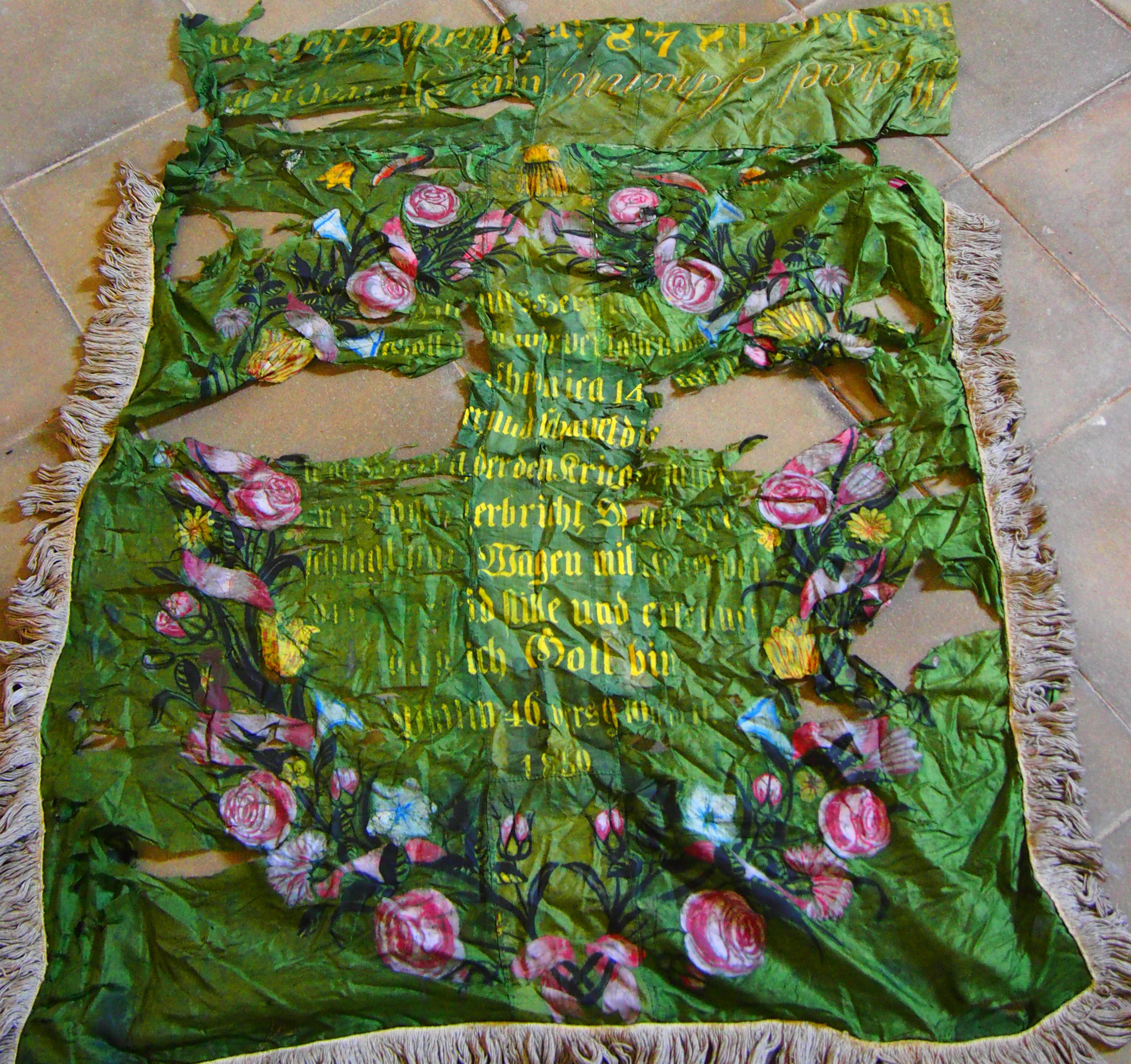 Die Fahne erinnert an die Teilnahme an der Revolution von 1848 in Ungarn / Siebenbürgen. Sie ist im Archiv der Evangelischen Kirche A.B. in Girelsau